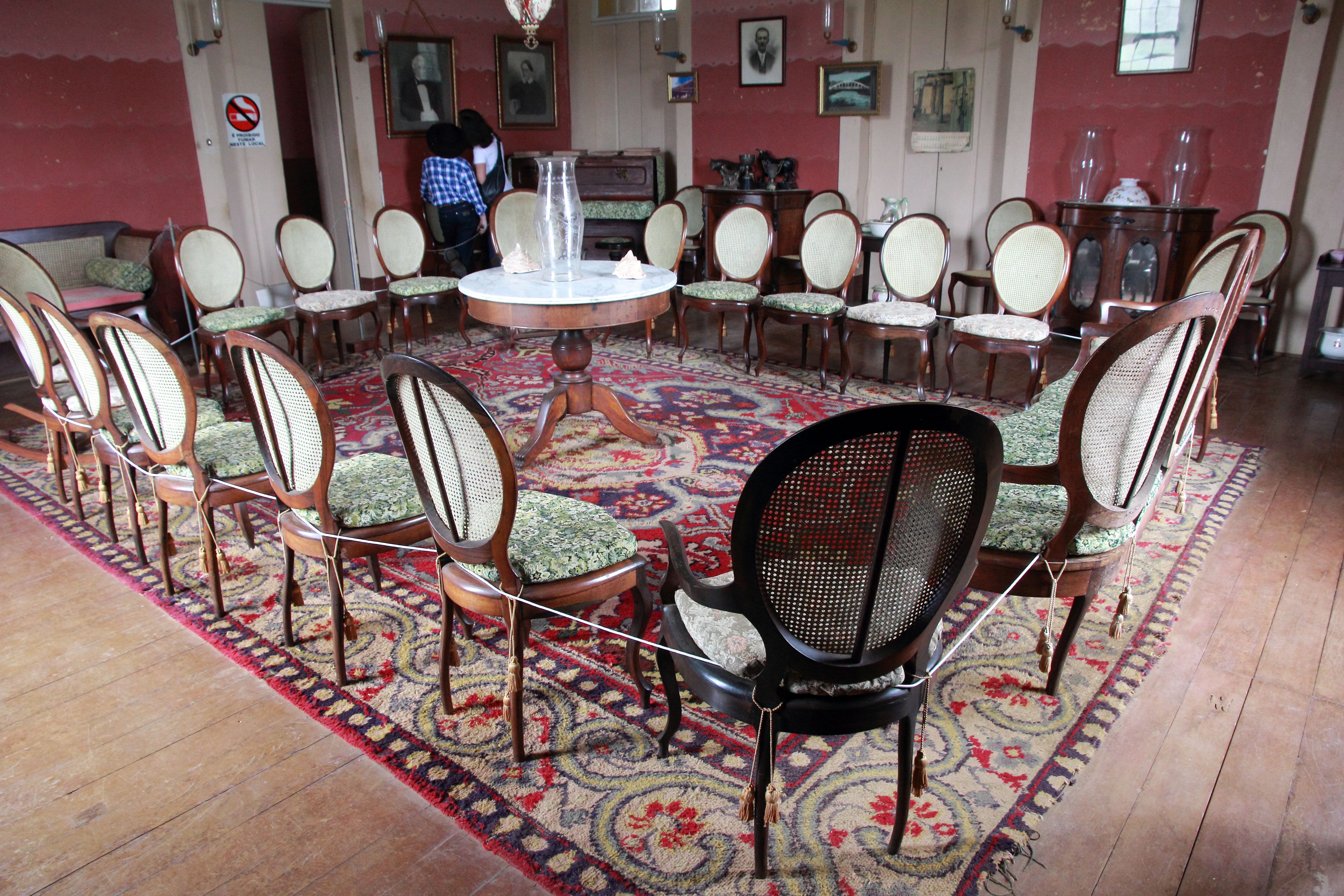 A Fazenda Santa Clara está localizada no município brasileiro de Santa Rita de Jacutinga, no estado de Minas Gerais.